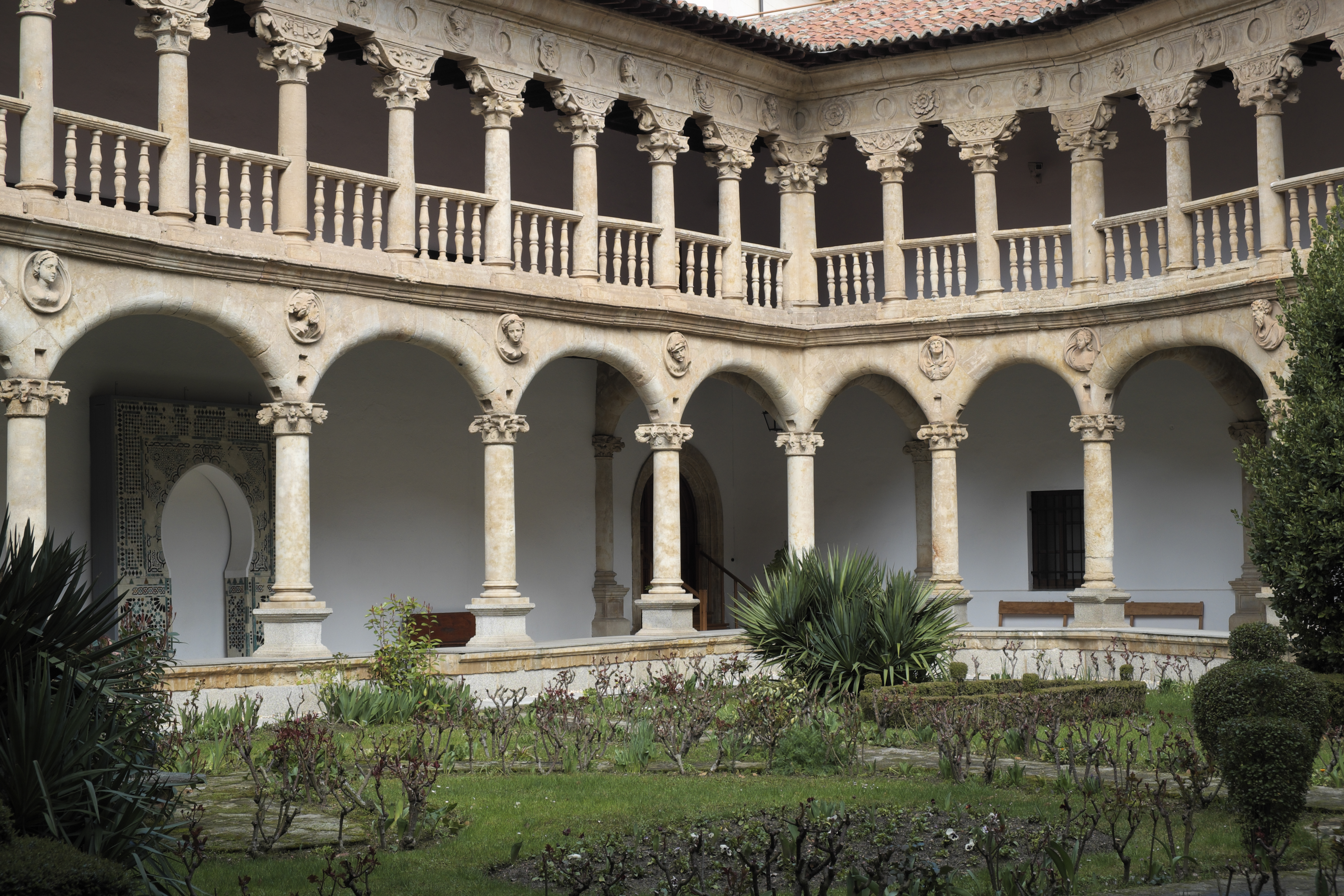 Dominikanerinnenkloster Convento de las Dueñas in Salamanca (Kastilien-León/Spanien), Kreuzgang